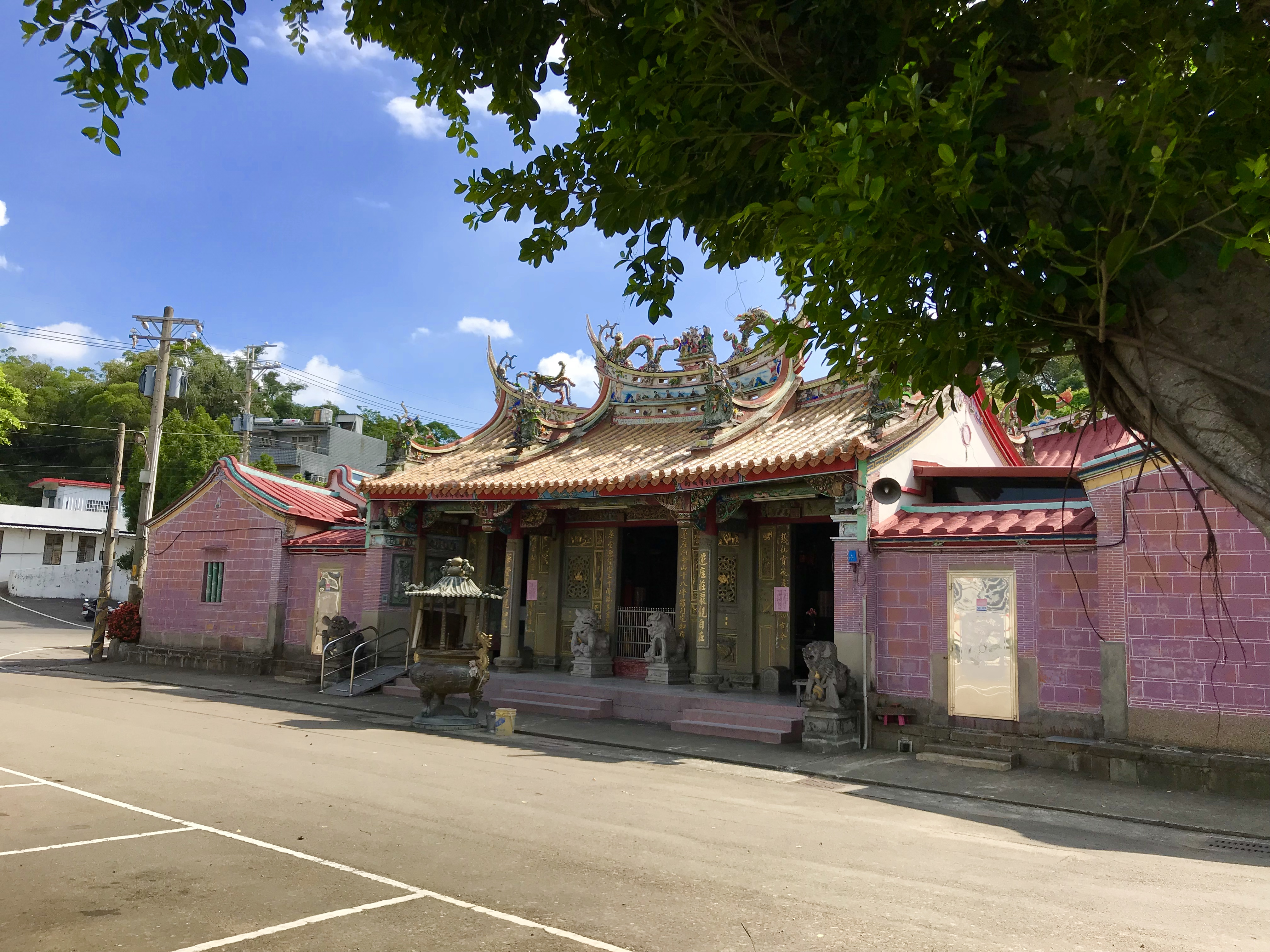 竹北蓮華寺斜照